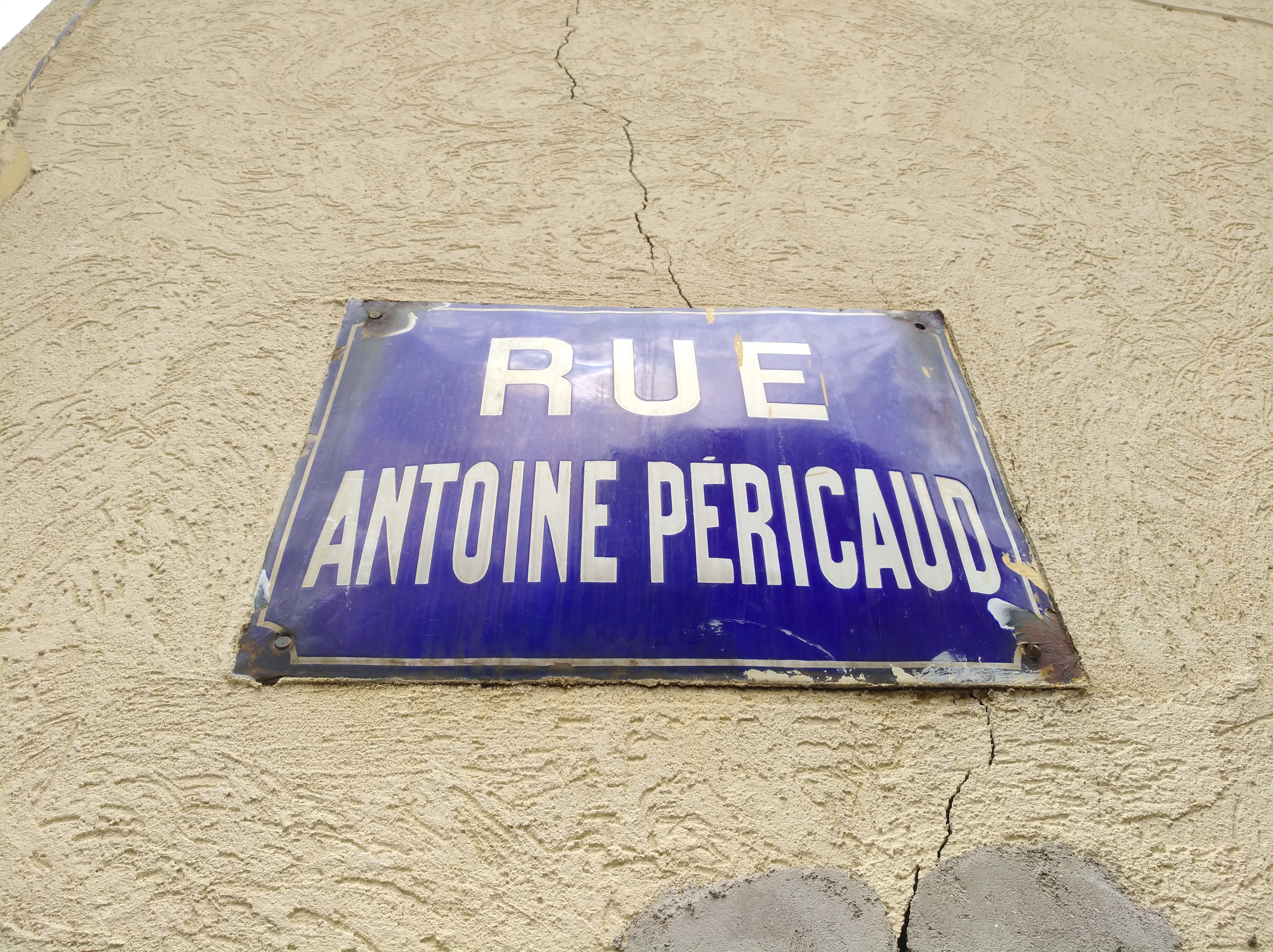 Plaque de la rue Antoine Péricaud, dans le 8e arrondissement de Lyon.